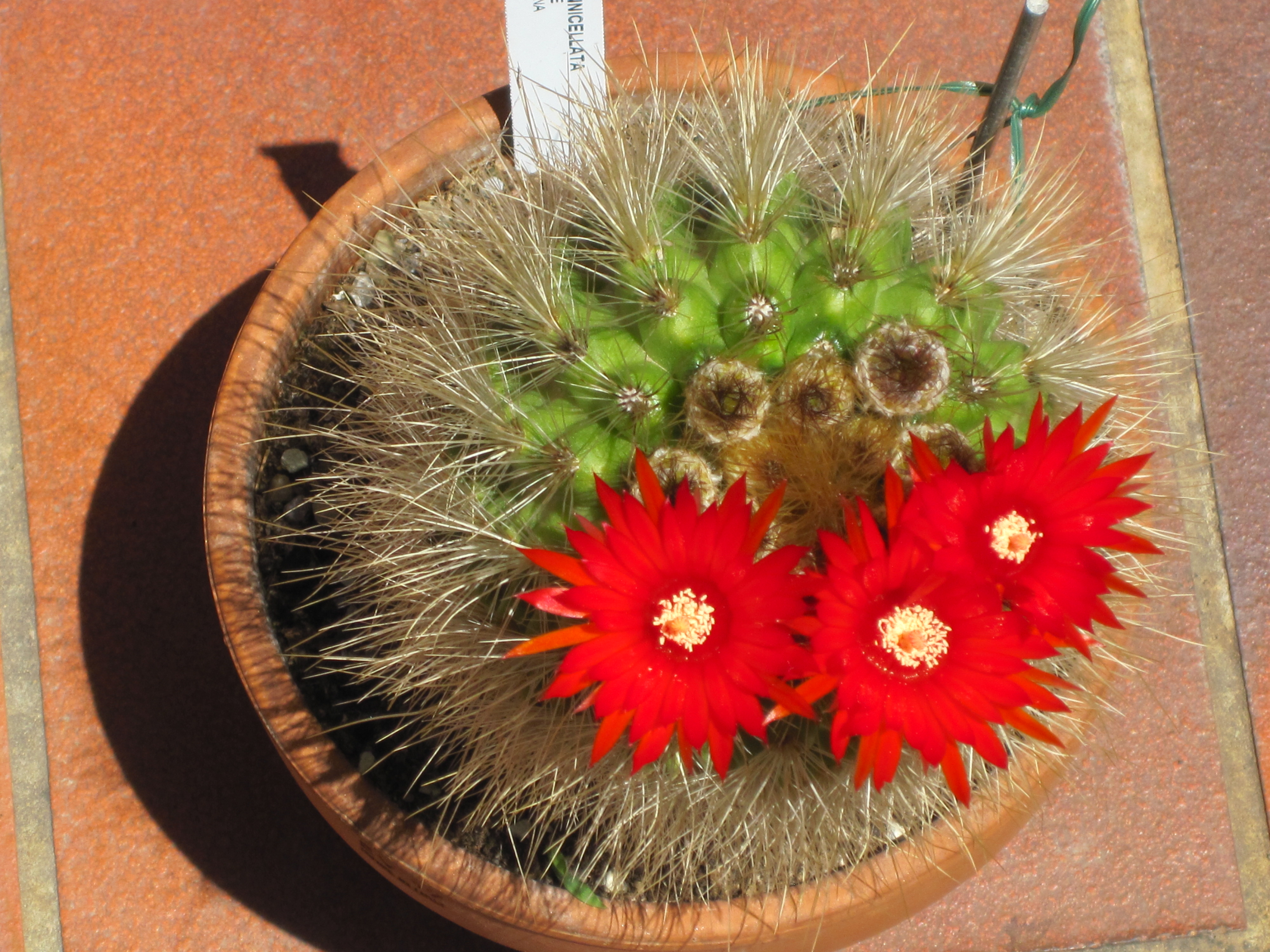 Parodia penicillata